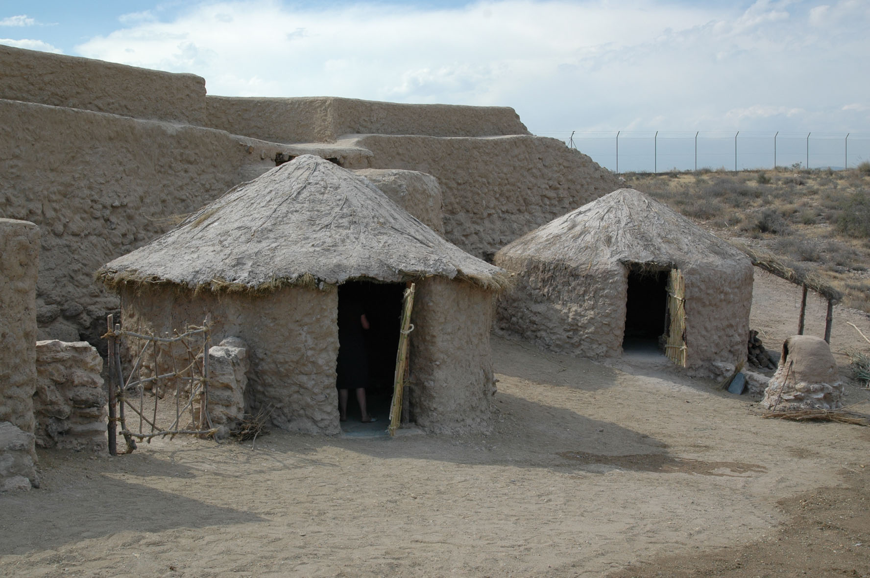 Enclave Arqueológico de Los Millares. Cabañas reconstruidas en la zona de interpretación.